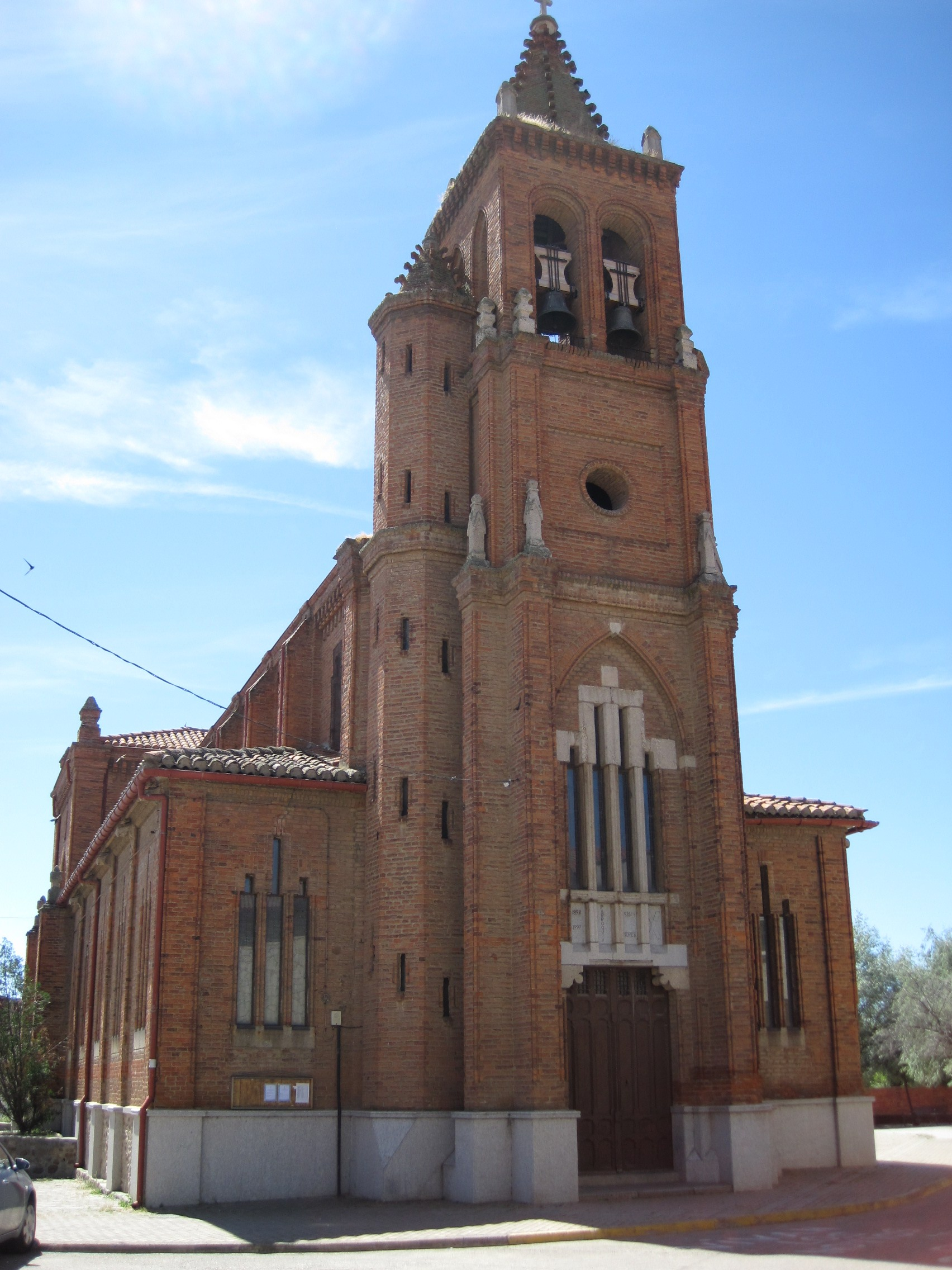 Fachada de la iglesia neomudéjar de San Andrés, en Astorga (León, España).